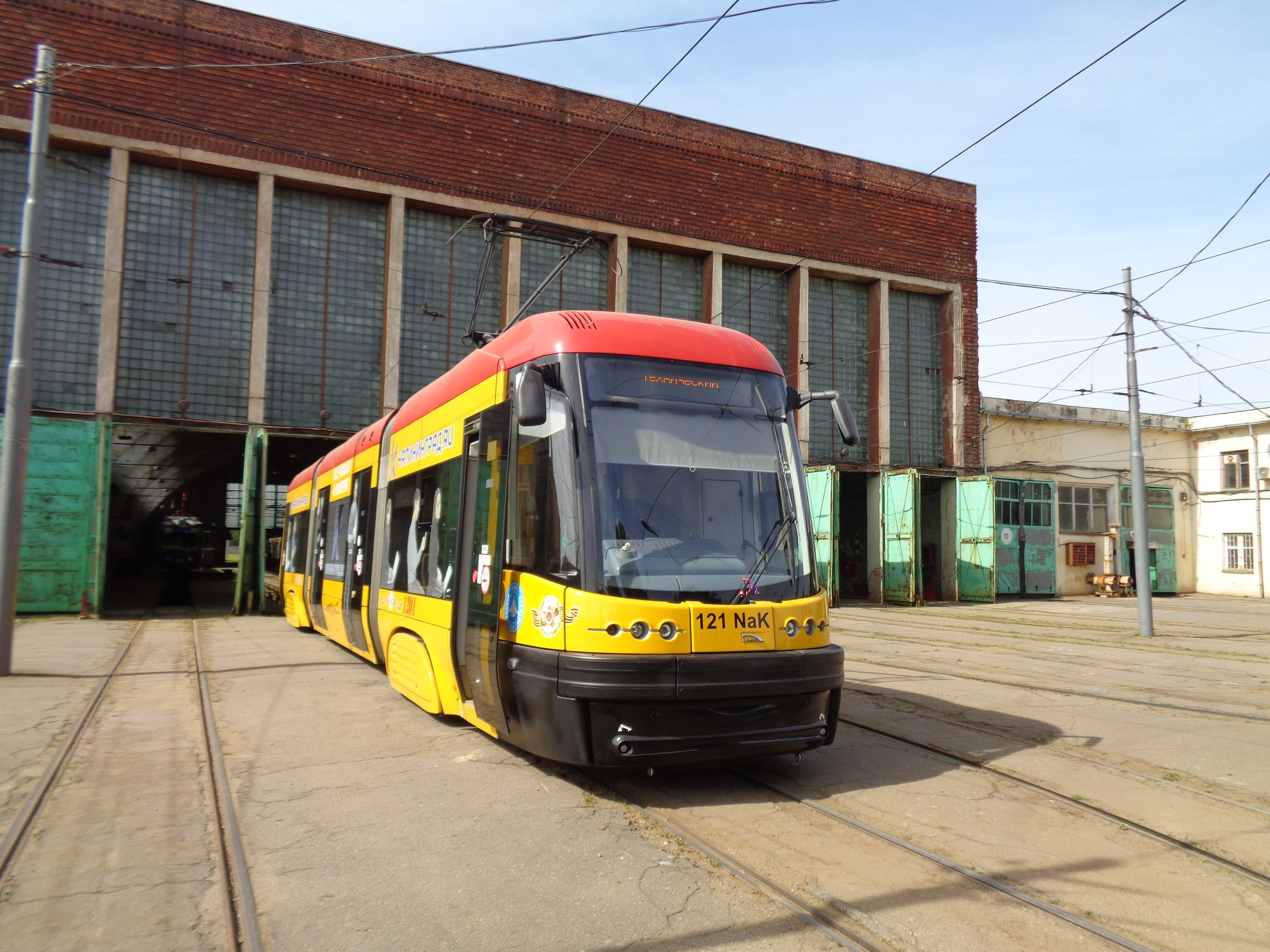 Трамвай Pesa 121NaK Калининград в трам. депо